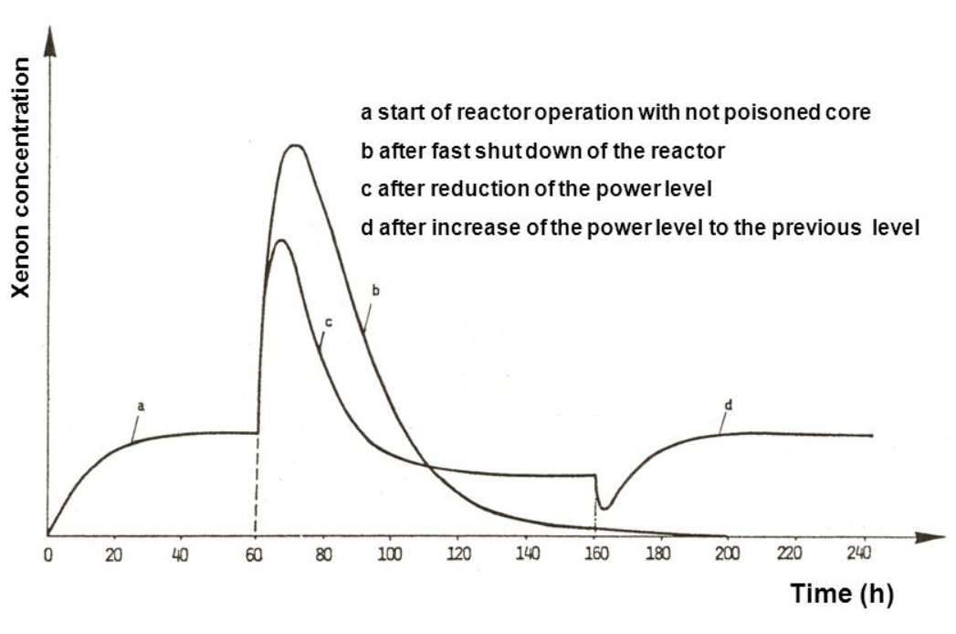 Andamento temporale della concentrazione dello Xenon durante la vita di un reattore nucleare: dall'accensione, allo spegnimento e al reincremento di potenza